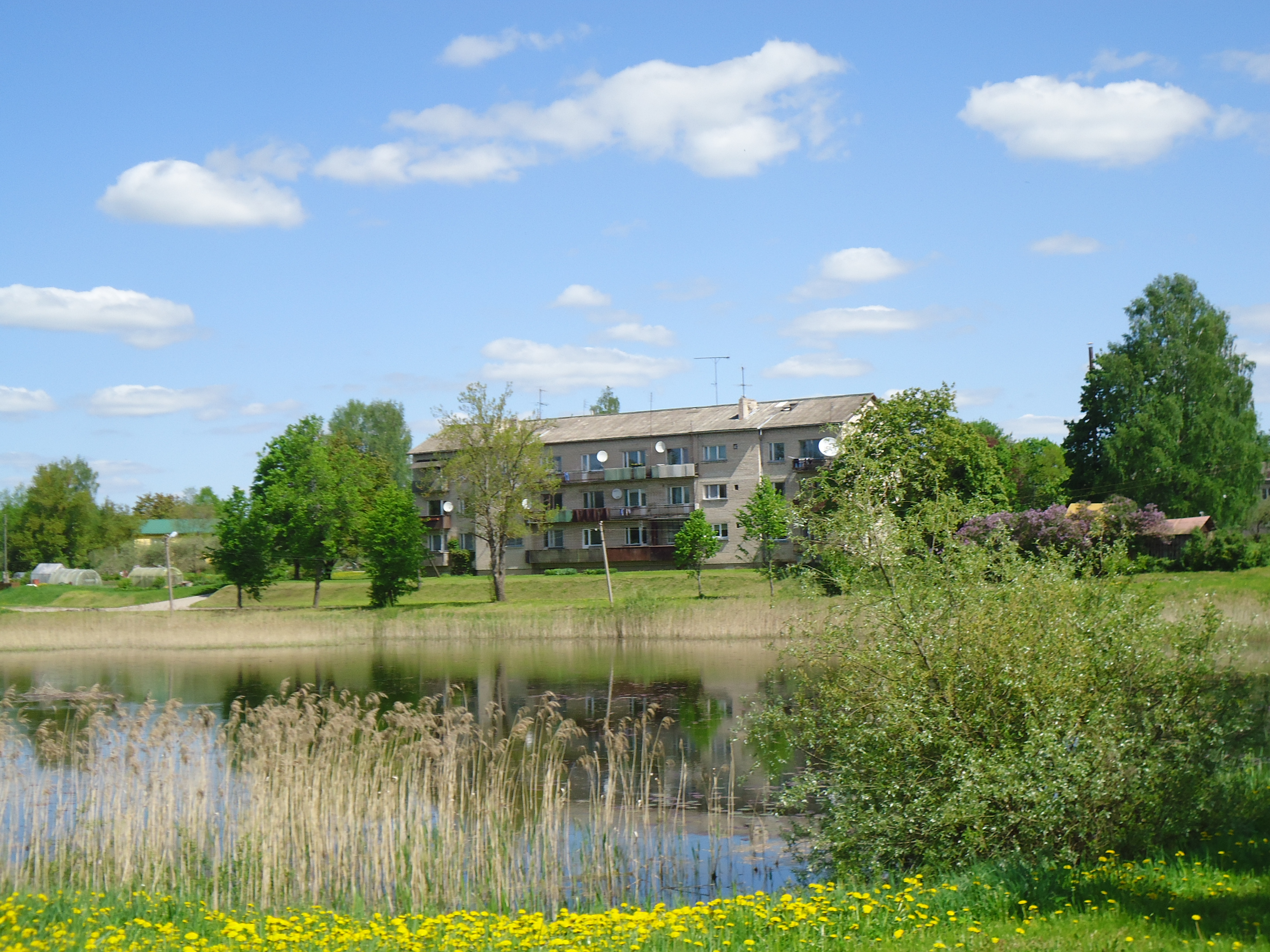 Dīķis Jaunkalsnavā